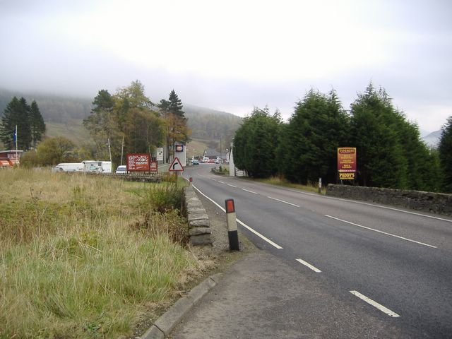 Tyndrum